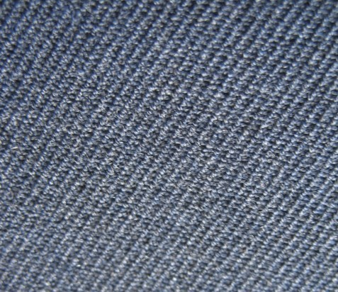 Gabardine aus PES/Wolle